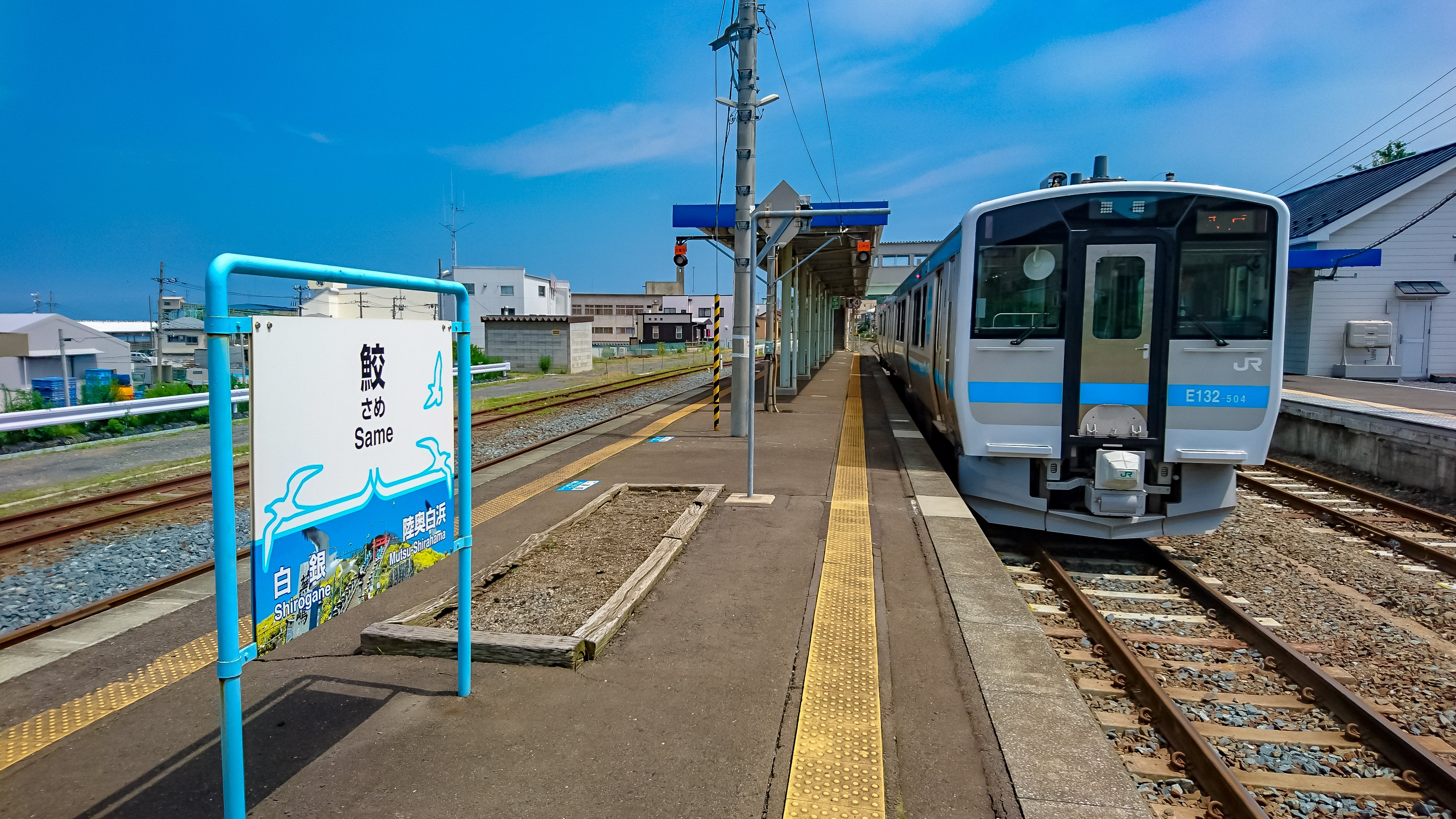 青森県八戸市、鮫駅、八戸線